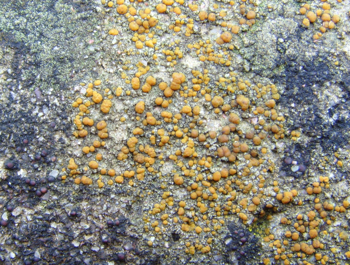 Protoblastenia rupestris St-Hélier (Rennes, Ille-et-Vilaine, Bretagne, France)